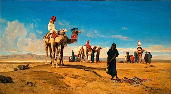 Halte de Bicharis dans le désert de Lybie, œuvre non sourcée, localisation inconnue.